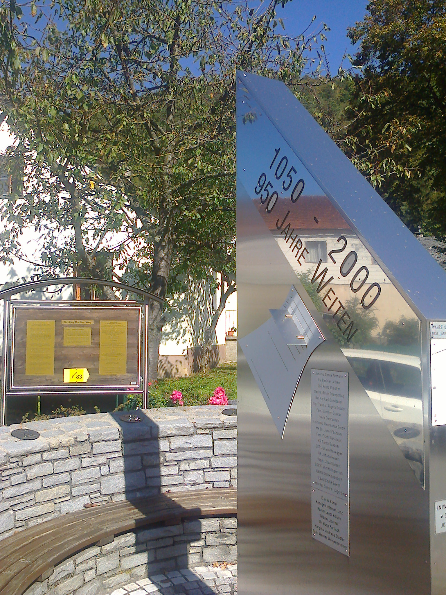 Hr. Jindra Johann, Schlossermeister und Alt-Bürgermeister, erbaute im Jahr 2000 diese Sonnenuhr.